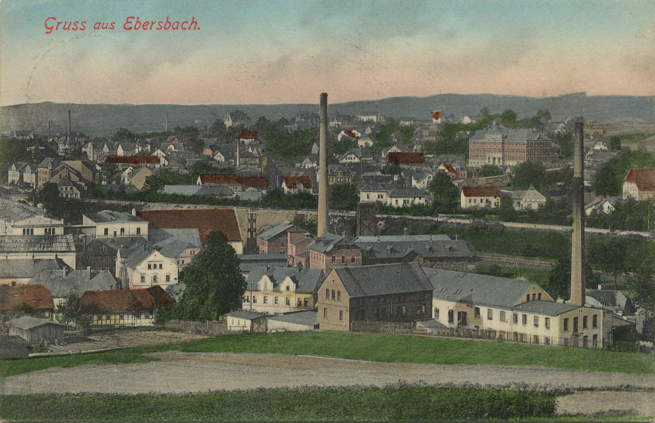 Ebersbach Stadtansicht 1908